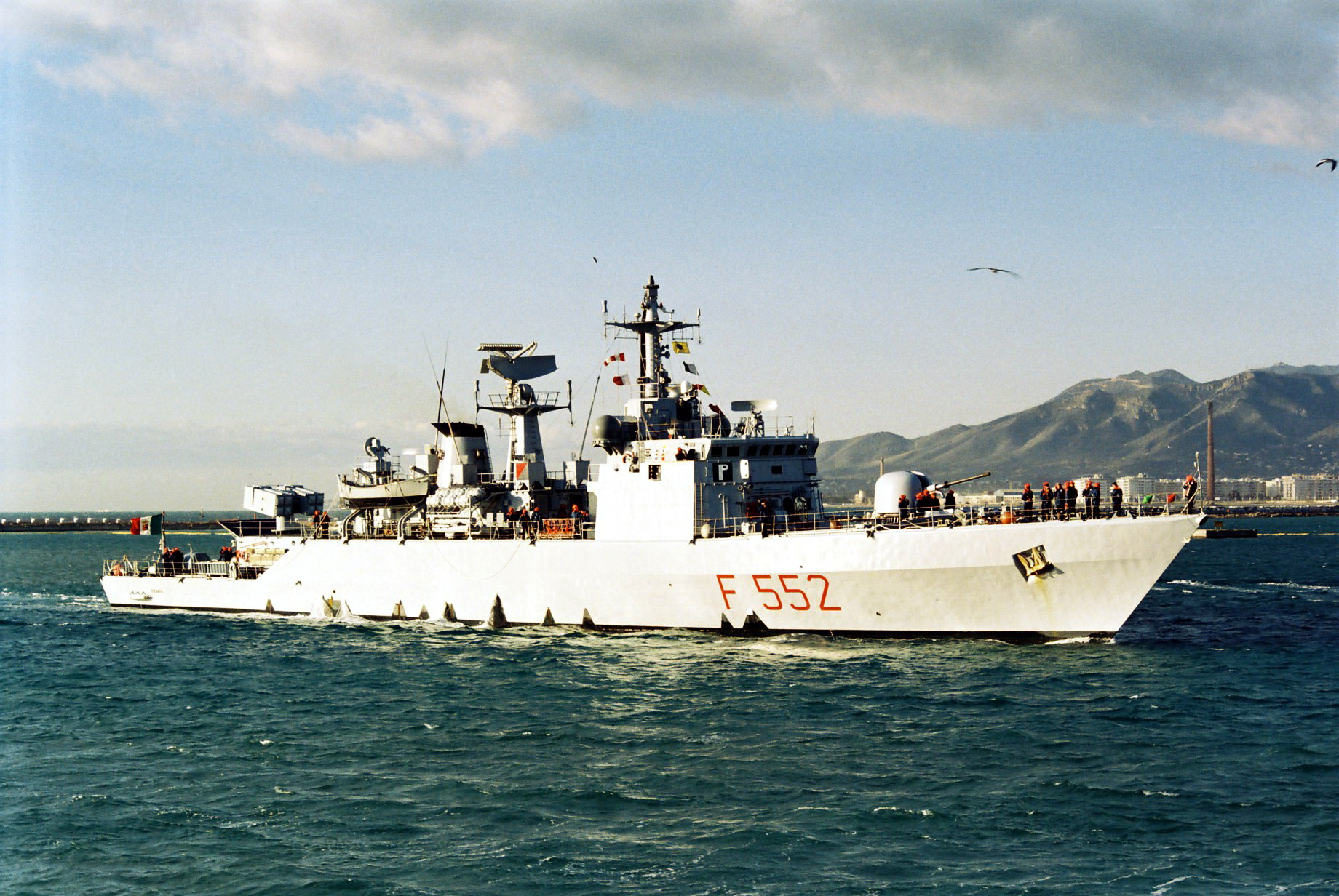 La corvetta Urania a Malaga